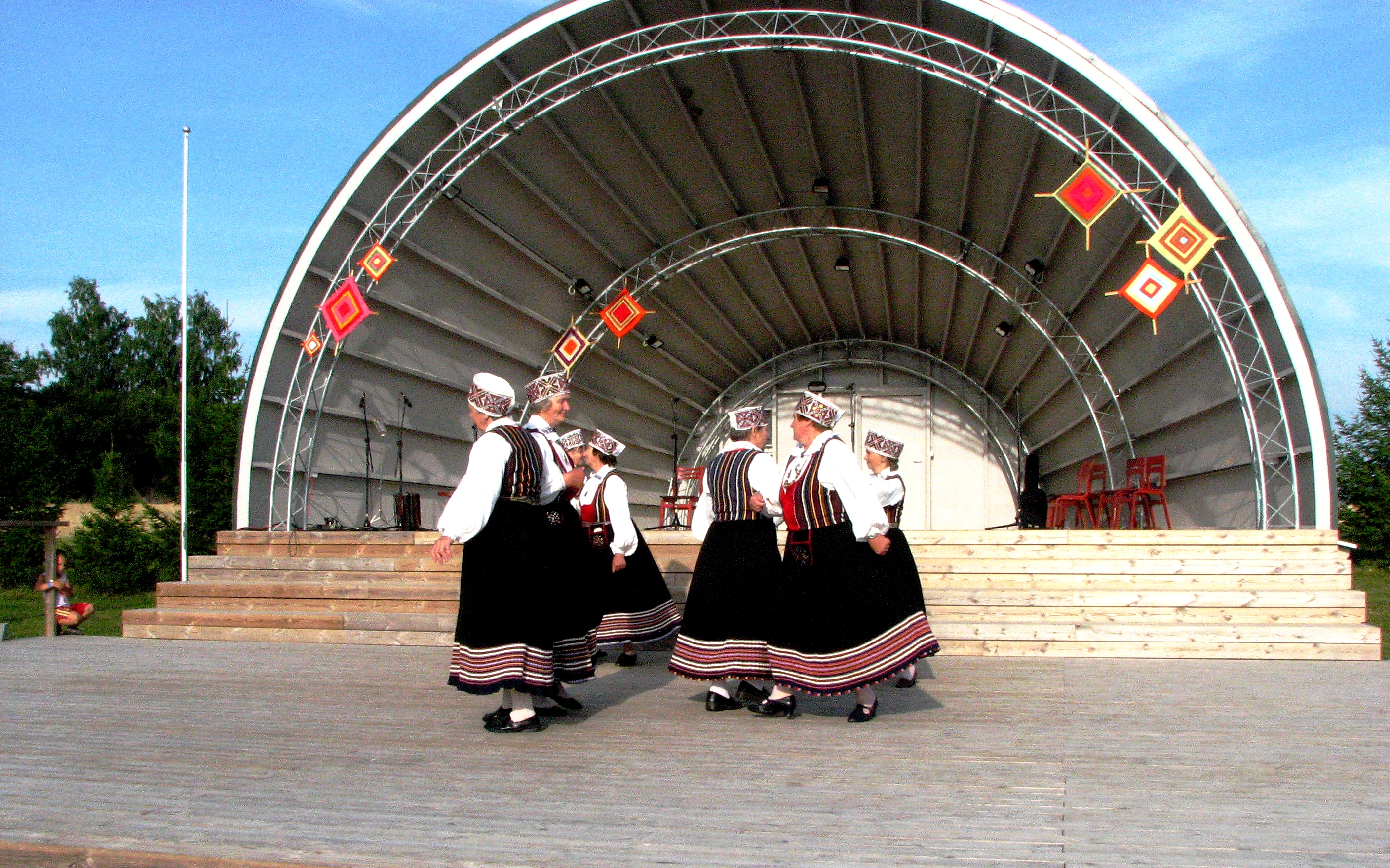 Tantsurühm "Viktooria" esinemas Jööri folgil